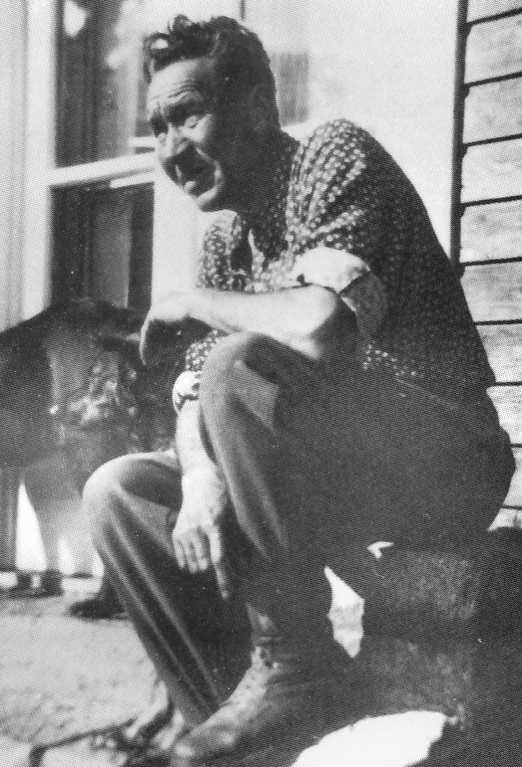 Majiteľ Zamkovského chaty - Vysoké tatry